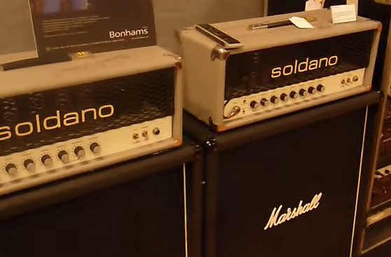 Dieses Bild von Eric Clapton's Soldano SLO-100 Verstärker-Paar habe ich im Jahr 2011 während einer Preview der Bonhams Auktion gemacht. Bearbeitet habe ich es 2015 - daher das abweichende Erstellungsdatum.